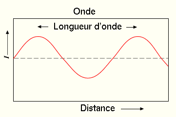 Schéma expliquant ce qu'est une longueur d'onde.